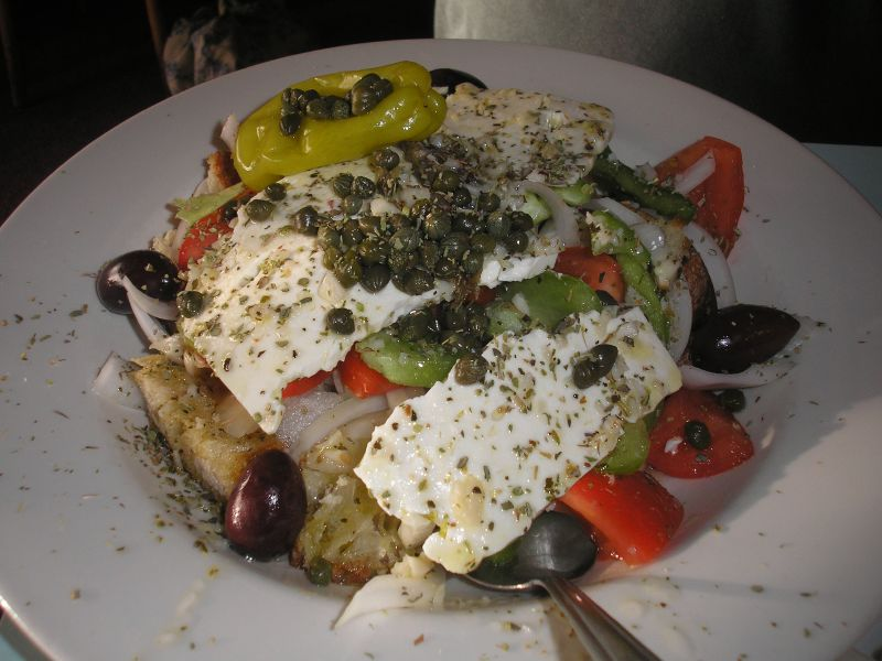 Salade crétoise, archétype du régime méditerranéen